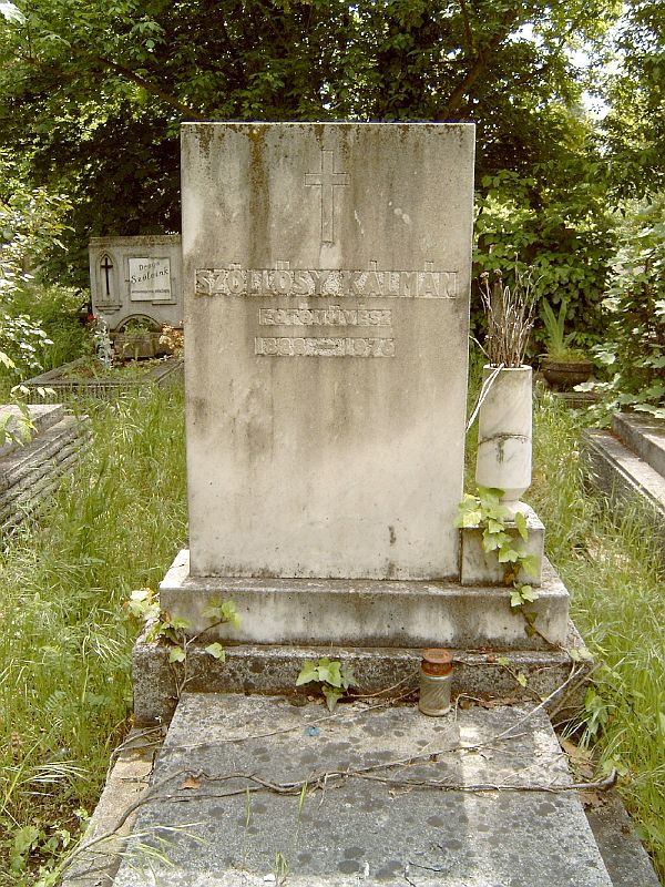 Szőllősy Kálmán (Pécs, 1887. szept. 10. – Bp., 1976. aug. 1.) fényképész, fotóművész sírja Budapesten. Új köztemető: 91/7-1-20.